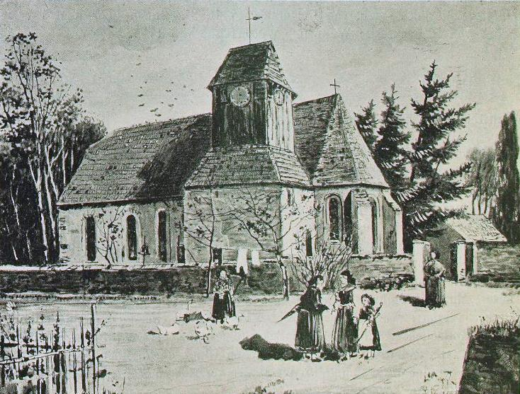 Hornjoserbsce: Rysowanka stareje Radworskeje wosadneje cyrkwje před wottorhanjom cyrkwinskeje łódźe w lěće 1896.